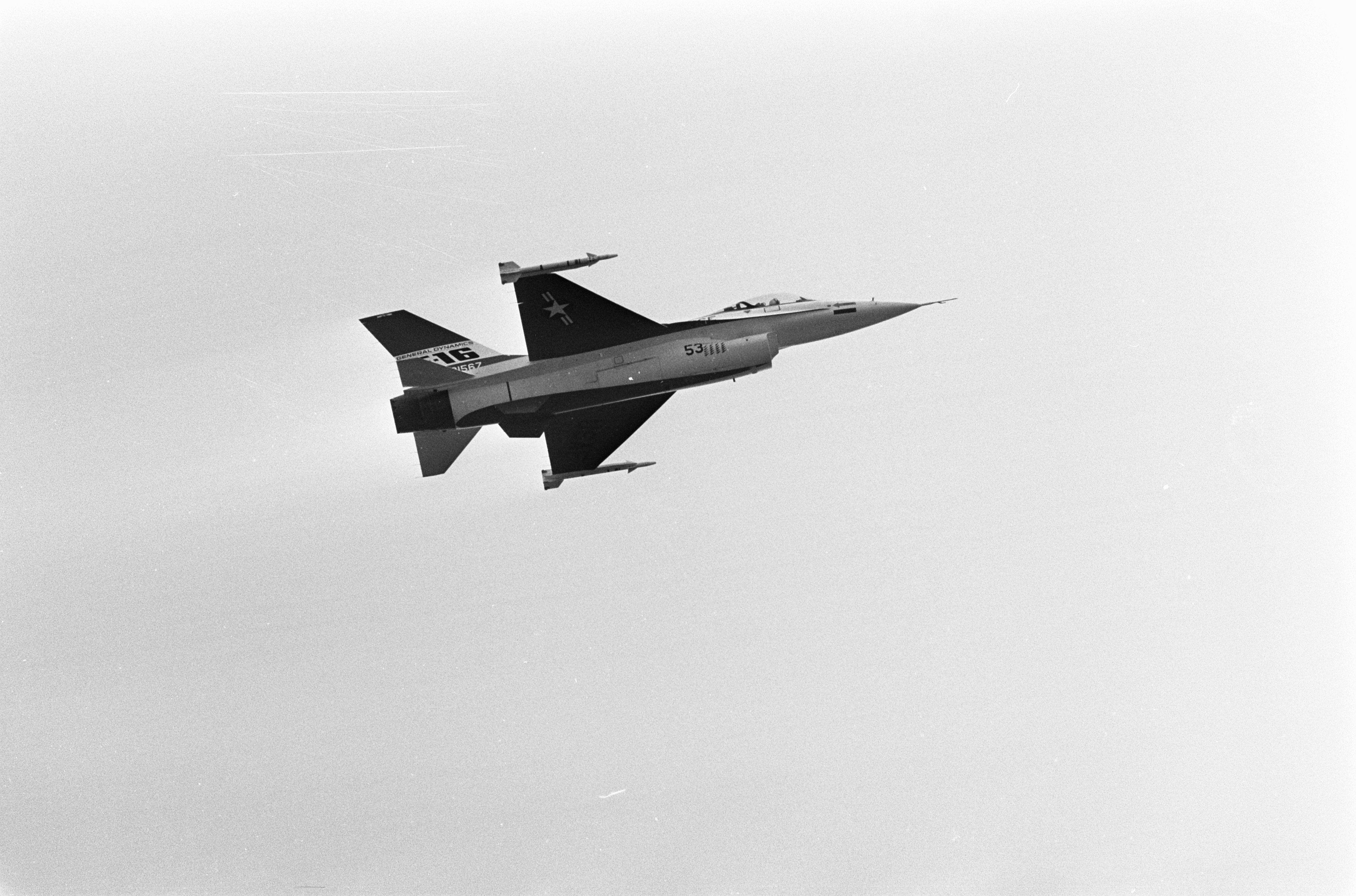 Collectie / Archief : Fotocollectie Anefo Reportage / Serie : Demonstraties van de F16 op vliegbasis Volkel Beschrijving : F16 tijdens een demonstratievlucht Datum : 19 juni 1975 Locatie : Noord-Brabant, Volkel Trefwoorden : jachtvliegtuigen Fotograaf : Fotograaf Onbekend / Anefo Auteursrechthebbende : Nationaal Archief Materiaalsoort : Negatief (zwart/wit) Nummer archiefinventaris : bekijk toegang 2.24.01.05 Bestanddeelnummer : 927-9978